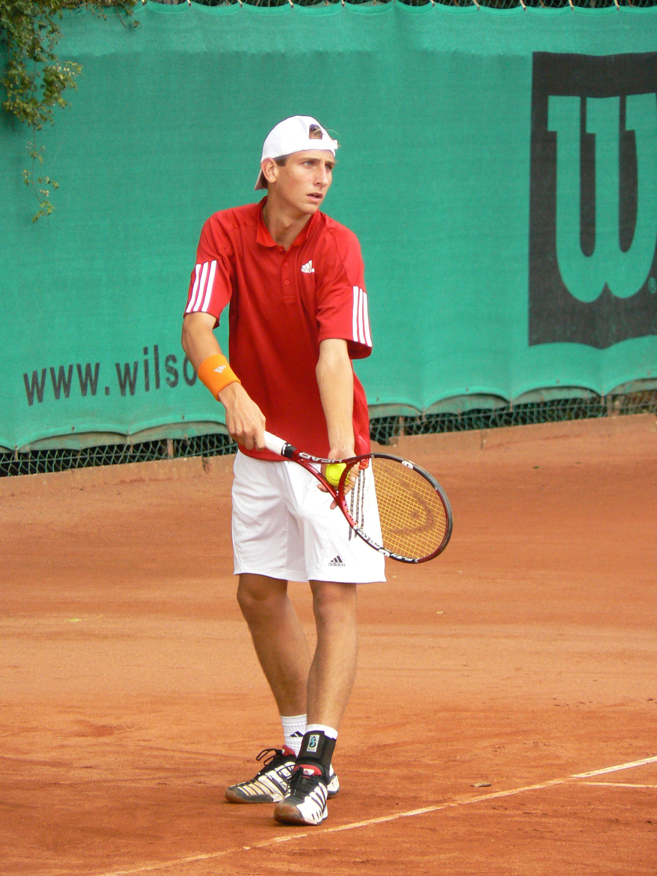 Thiemo de Bakker serveert tijdens het Ricoh Nederlands Tenniskampioenschap van 2006 in Amsterdam.